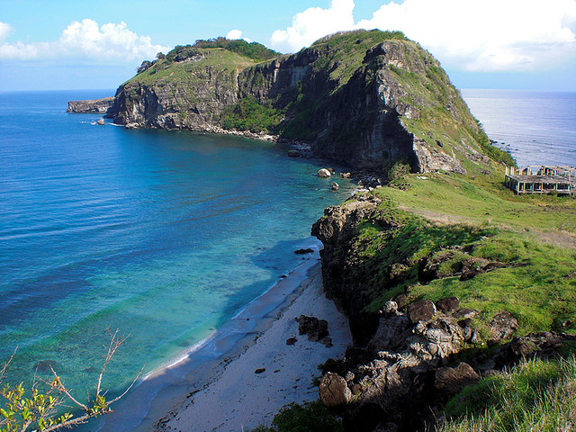 Capones Island, San Antonio, Zambales, Philippines